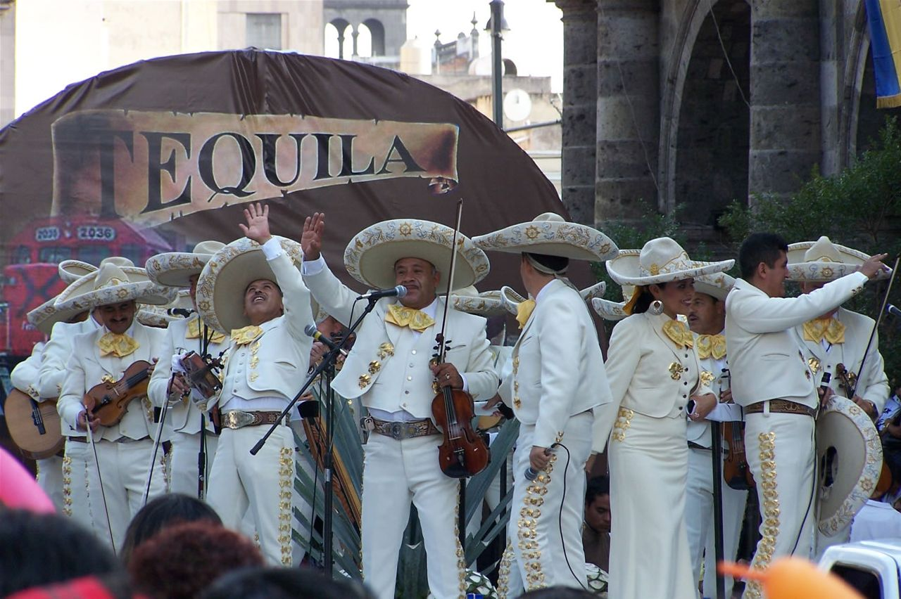 Mariachi en la ciudad de Guadalajara, Jalisco, México.